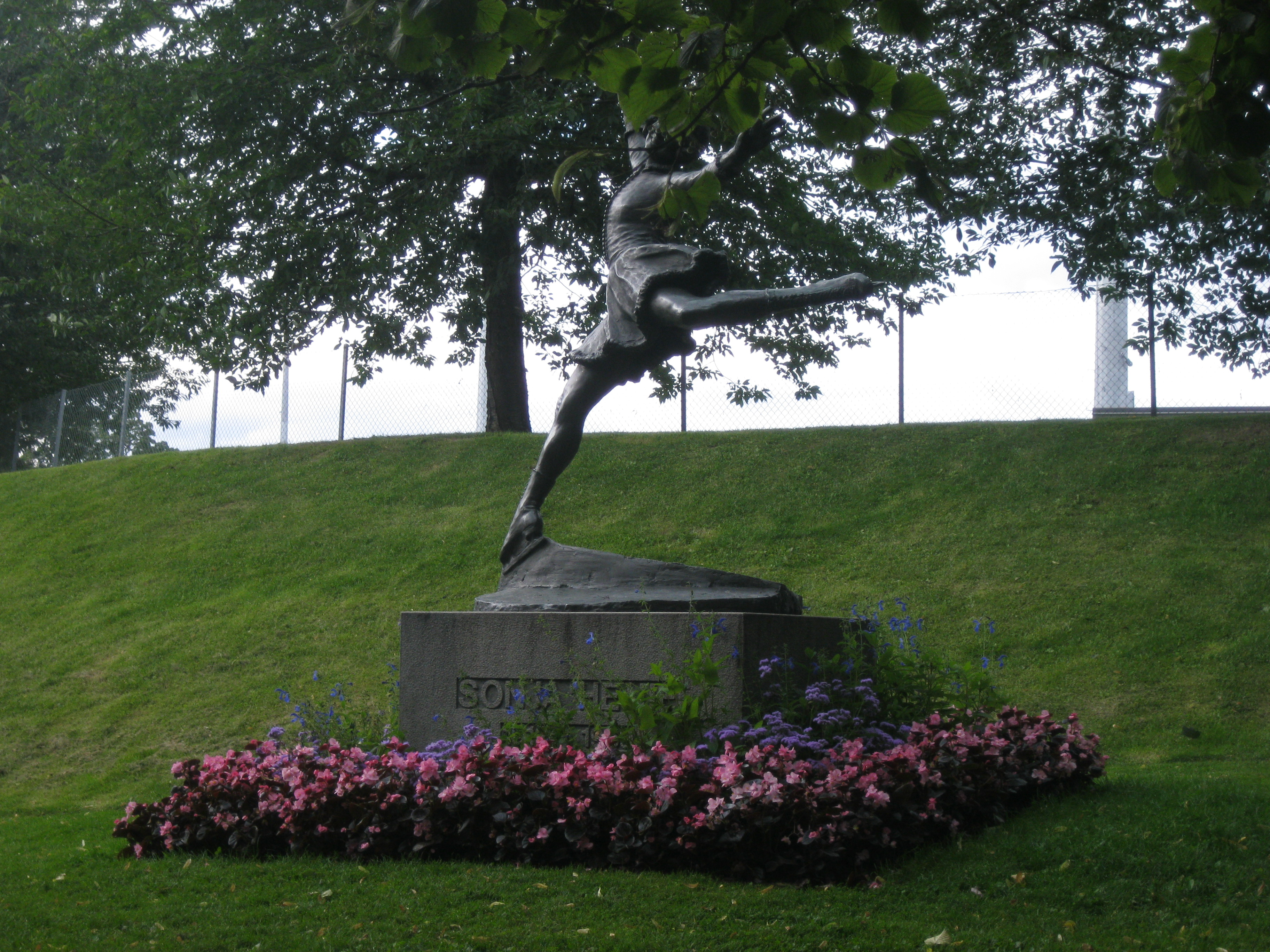 "פסל של סוניה הני, אוסלו, אוגוסט 2012."